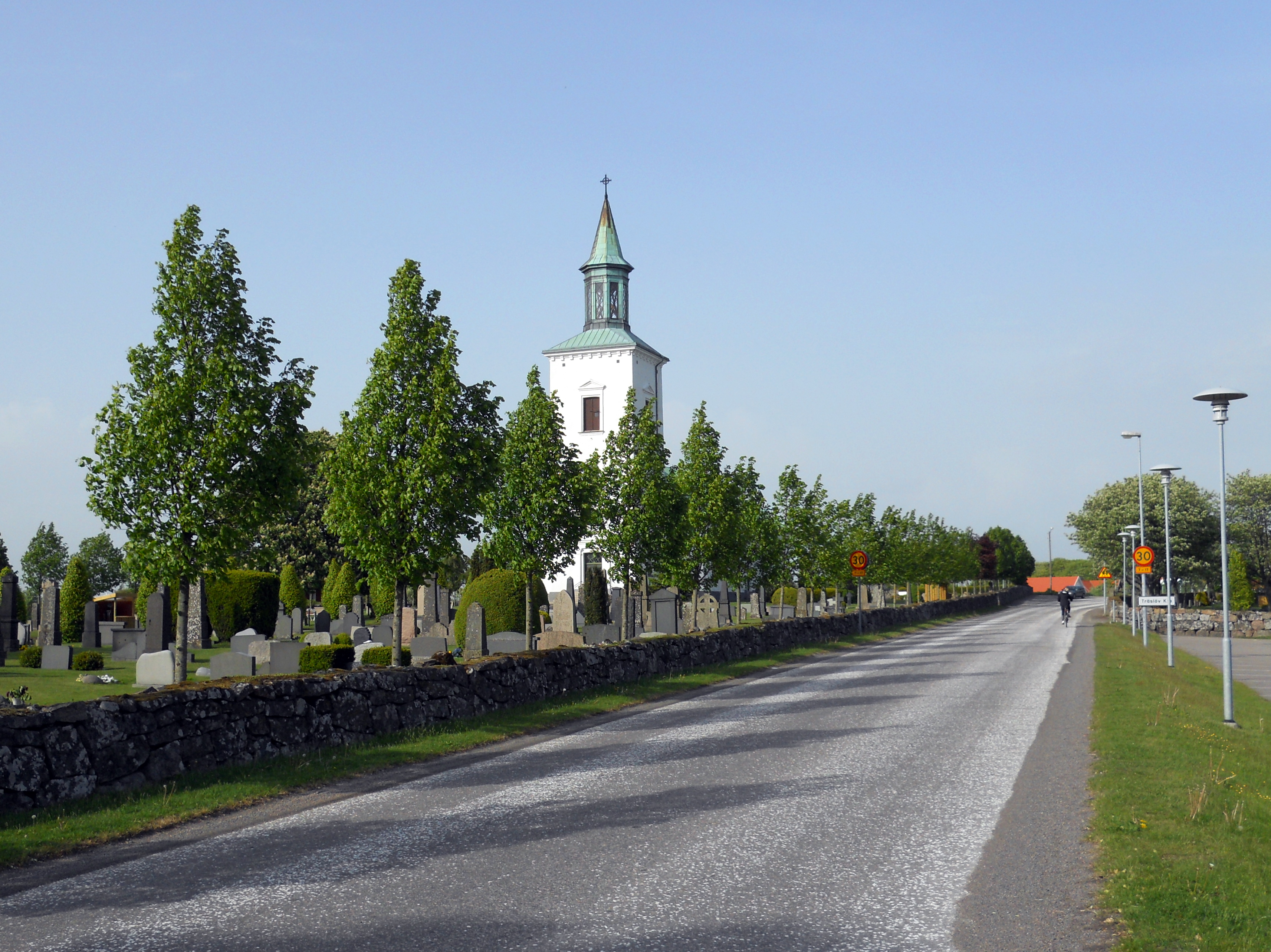 Träslövs kyrka, Halland.